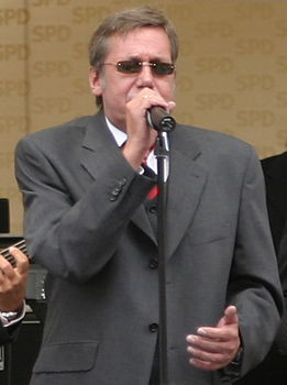 Roland Kaiser (Roland Kaiser), Schlagersänger und Unterstützer Gerhard Schröders, bei einer Wahlkampfkundgebung der SPD in München